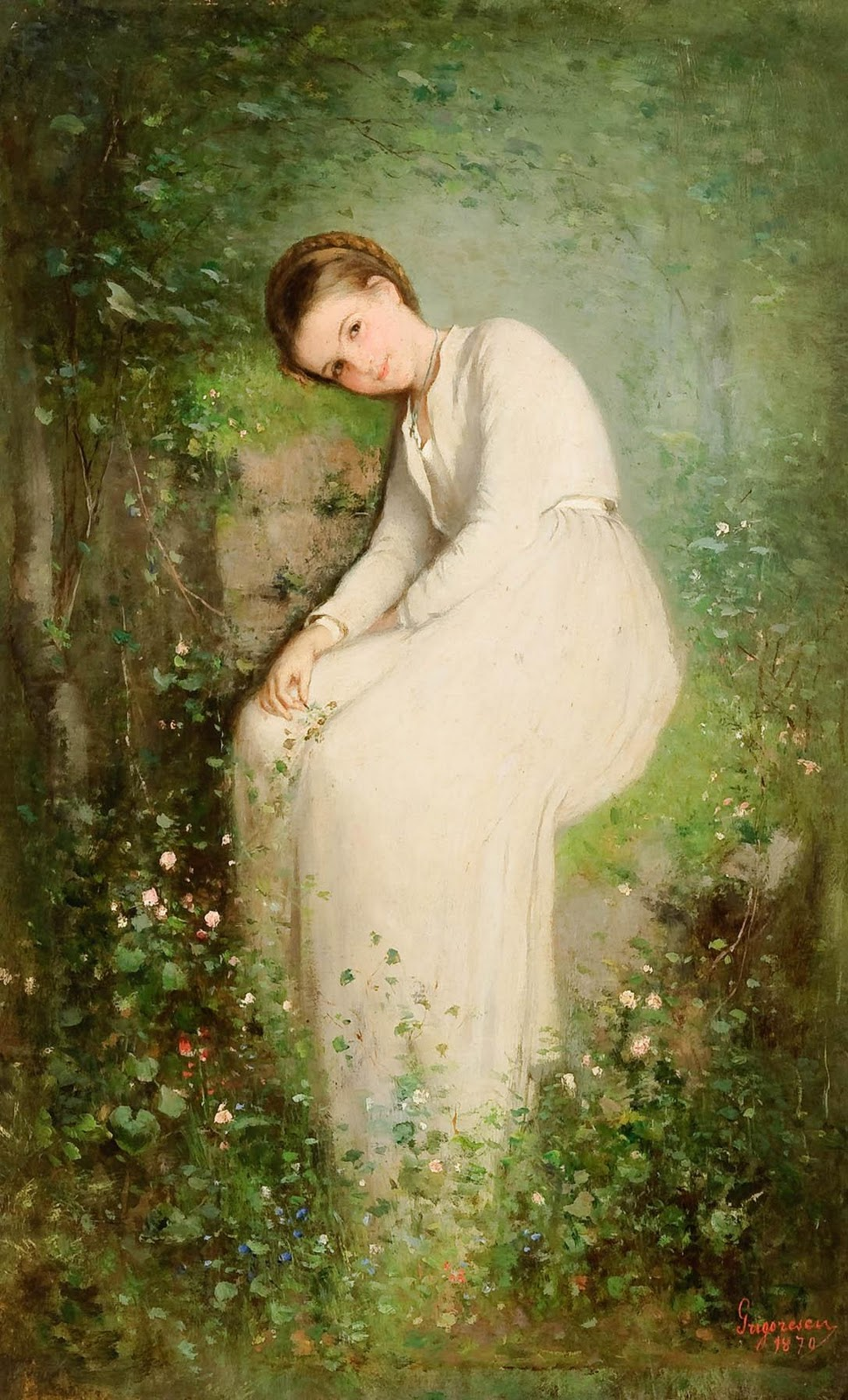 Portretul fiicei pictorului Millet - pe care Grigorescu îl cunoaşte la Barbizon - este lucrat cu atenţie pentru detaliu, minuţios, cu tuşe fine. Fata, îmbrăcată în rochie albă, în atitudine şăgalnică, este înconjurată de un cadru de trandafiraşi alb-roz. Fundalul sugerează vegetaţia.